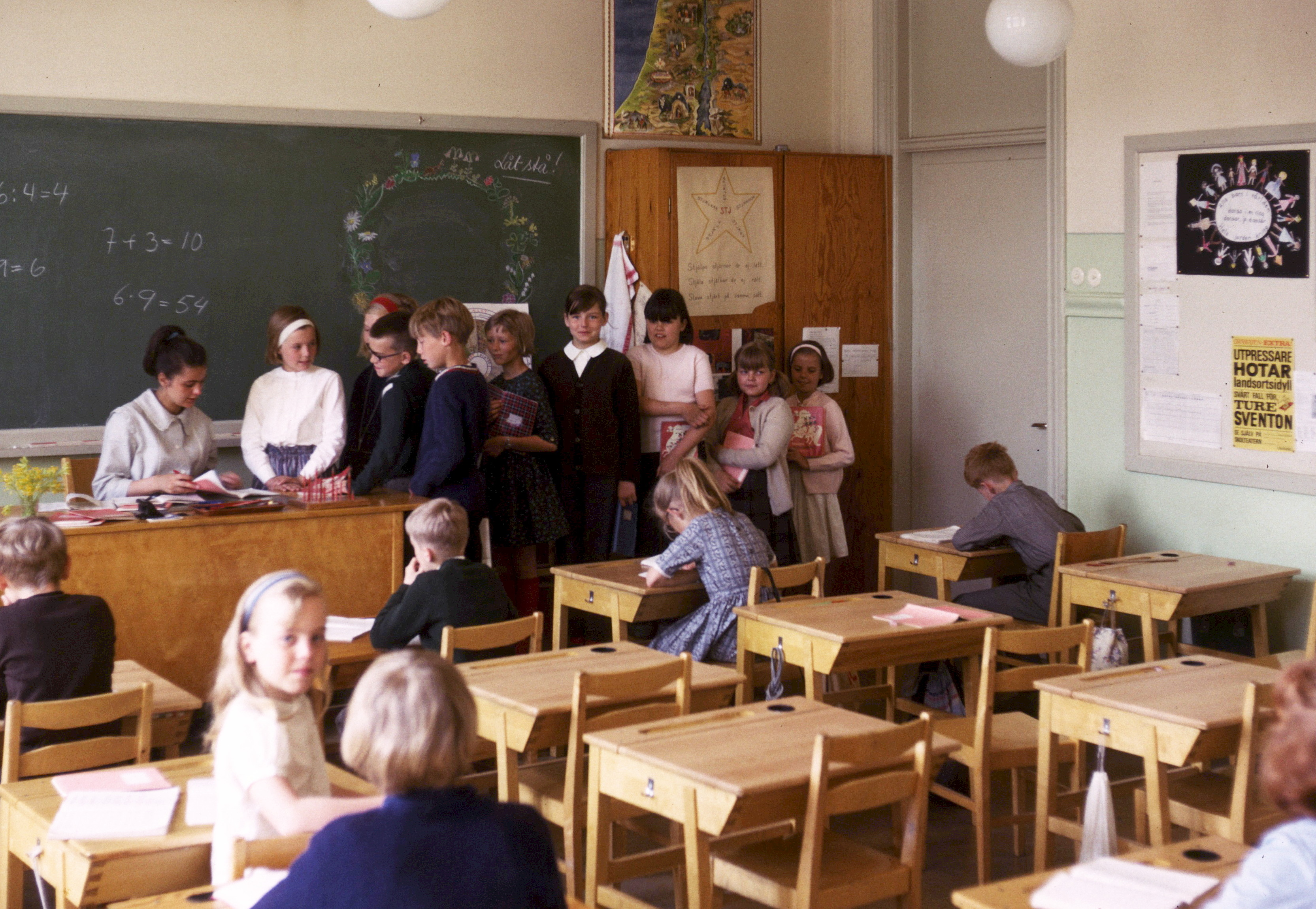 froken seth 3rd grade matteus skola john-6-65